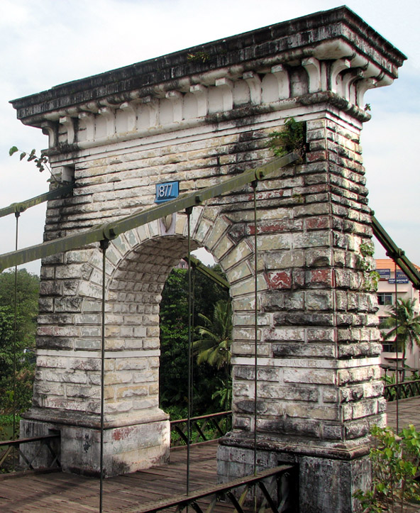 Punalur Bridge